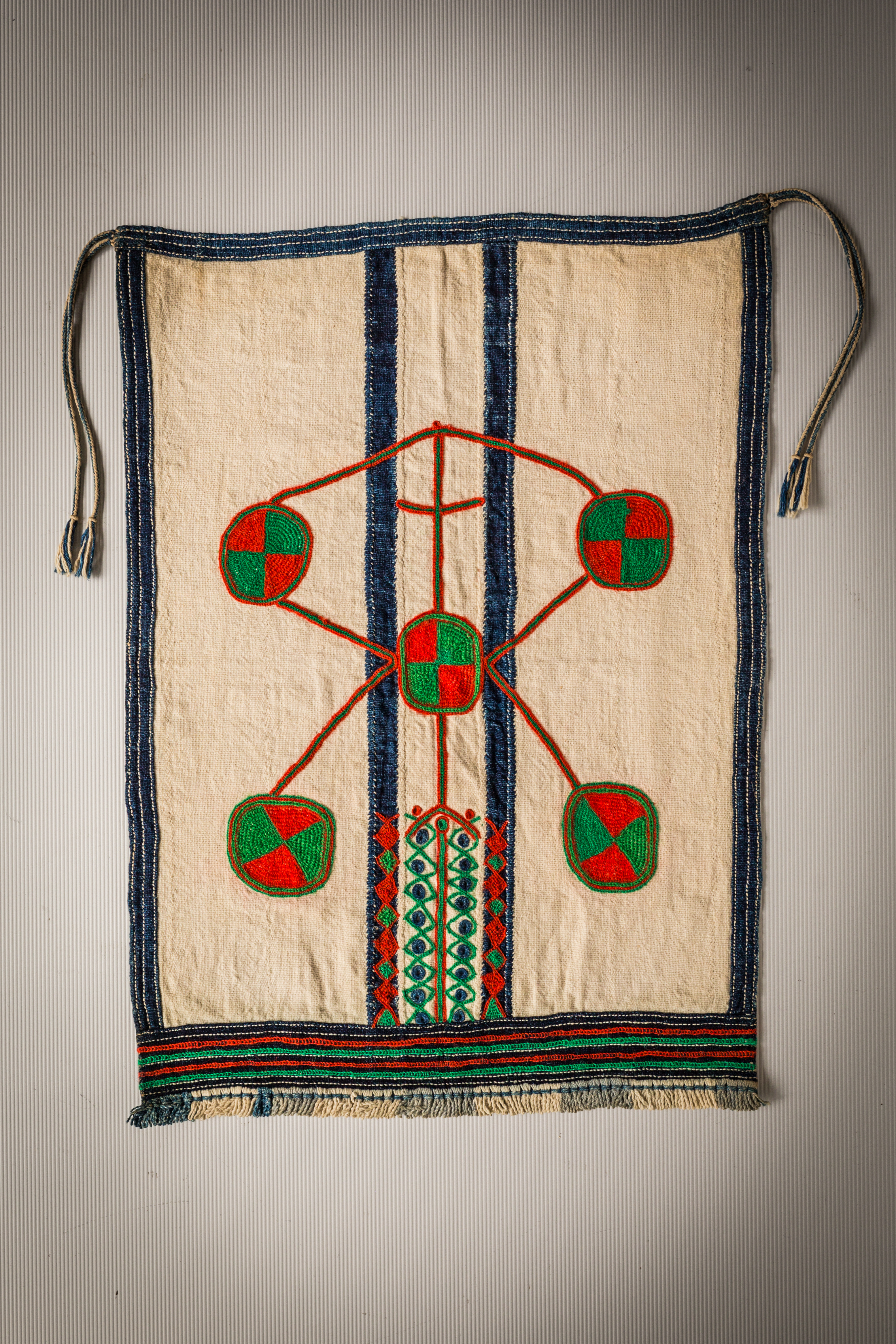 Pagne brodé Takpesi Provenance : Cameroun (Fali Tinguelin) Matériaux : végétal (coton) ; animal (laine) Collections d'objets ethnographiques de l'université de Strasbourg (cf. fiche détaillée dans la base de données Ethno de la Maison interuniversitaire des sciences de l'homme - Alsace) N° d'inventaire : 2002.0.070